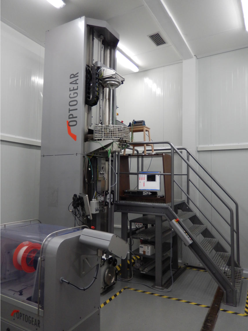 EHUko Applied Photonics Group(Bilboko Ingeniartza Goi Eskola) taldearen PZO fabrikazio dorrea Leioako kanpusean.